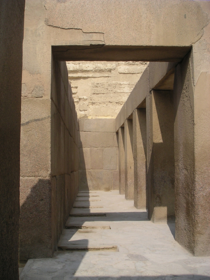 Vue sur la salle en "T" soutenue par des piliers monolithiques en granit rouge d'Assouan. On distingue nettement au sol les encoches dans lesquelles venaient s'insérer les statues du roi - Temple d'accueil de Khéphren - Gizeh - IVe dynastie égyptienne